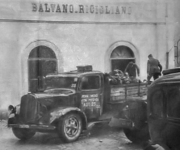 Trasporto delle salme delle vittime dell'incidente ferroviario di Balvano del 3 marzo 1944 verso la fossa comune